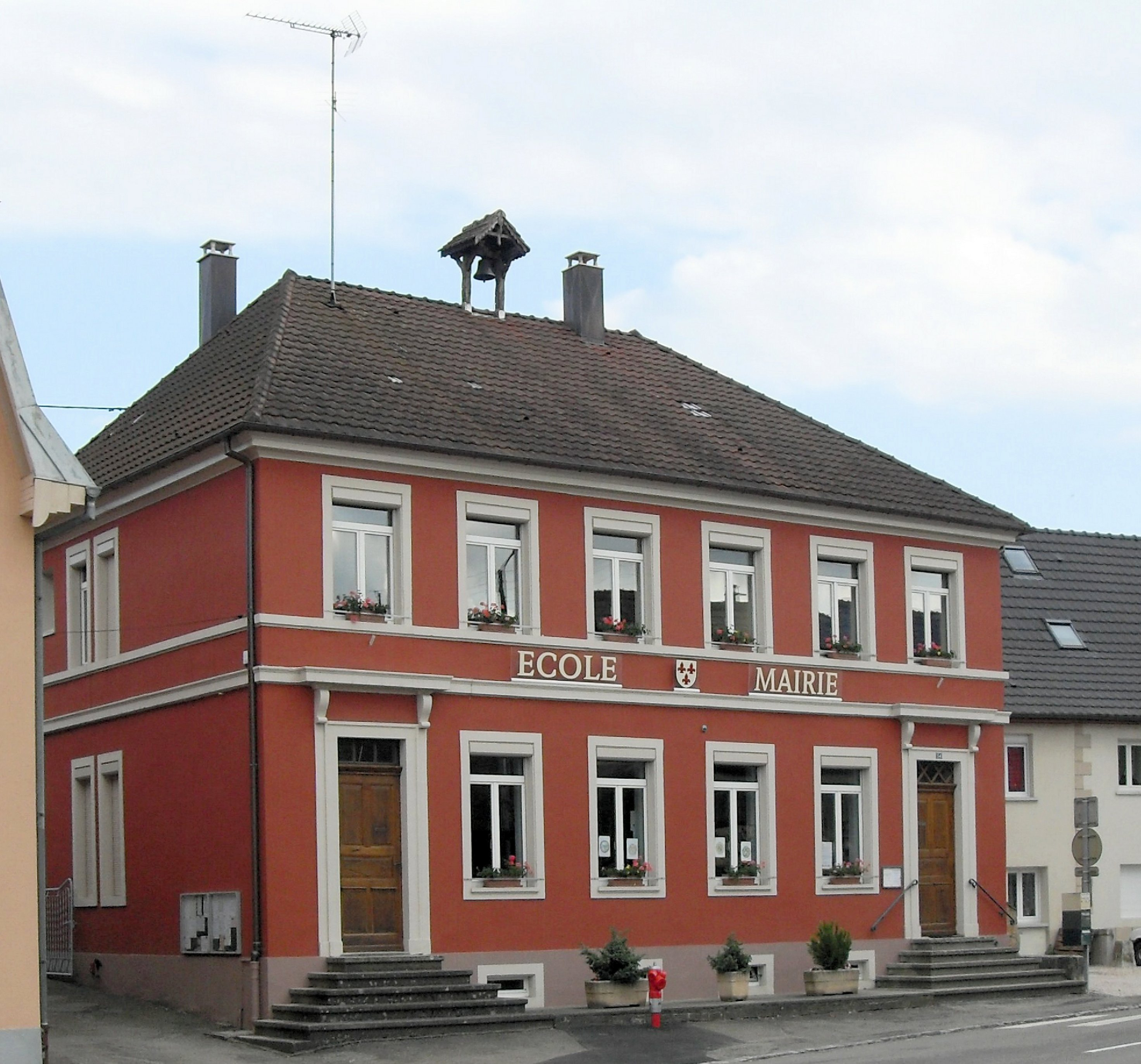 Le mairie-école de Courtavon